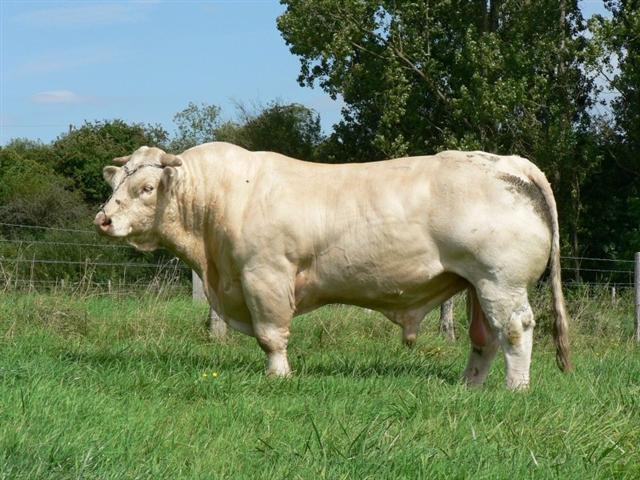 Taureau charolais (France).